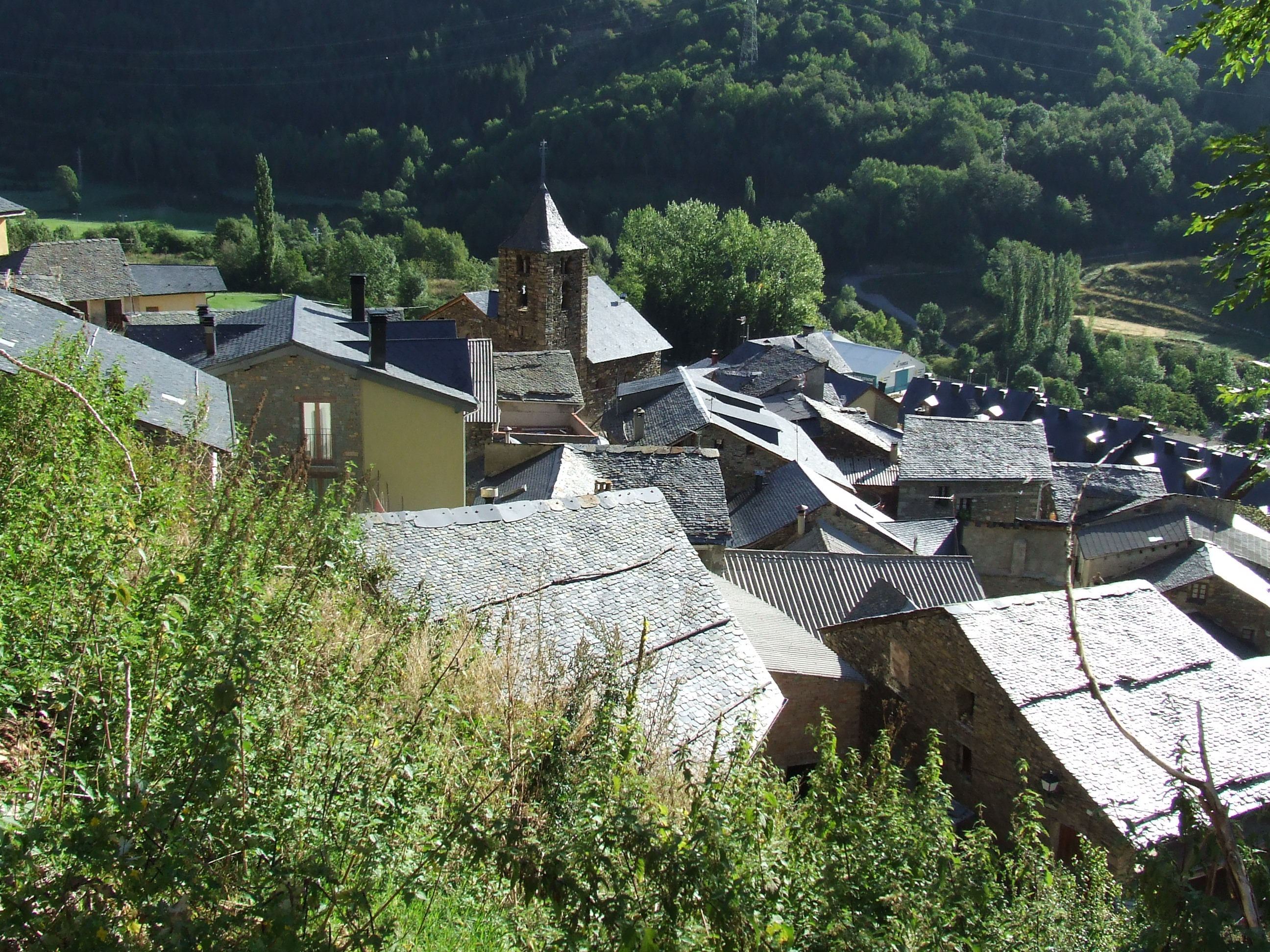 El poble d'Espui des del sud-oest (la Torre de Cabdella, Pallars Jussà)